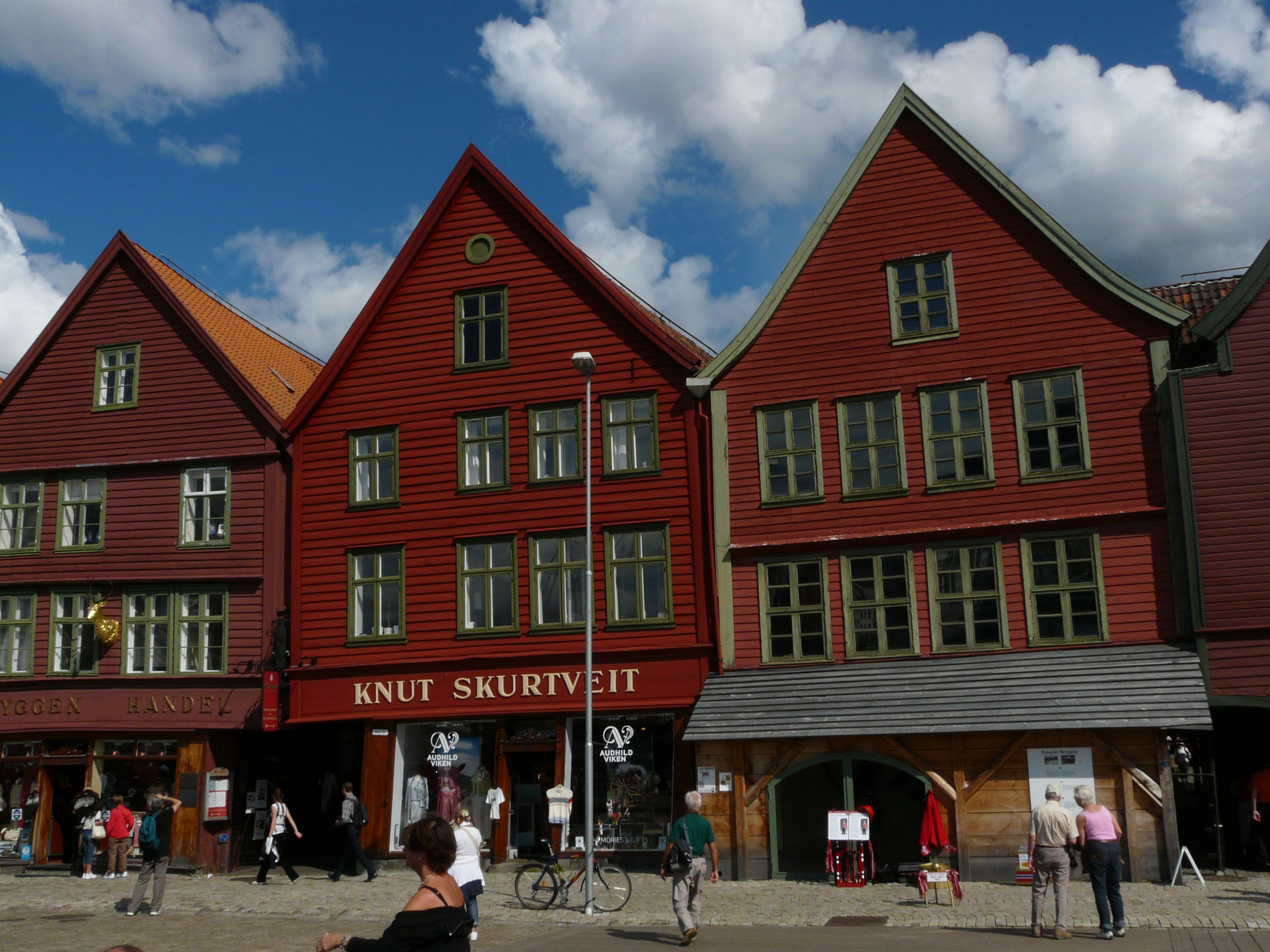 Bryggen in Bergen